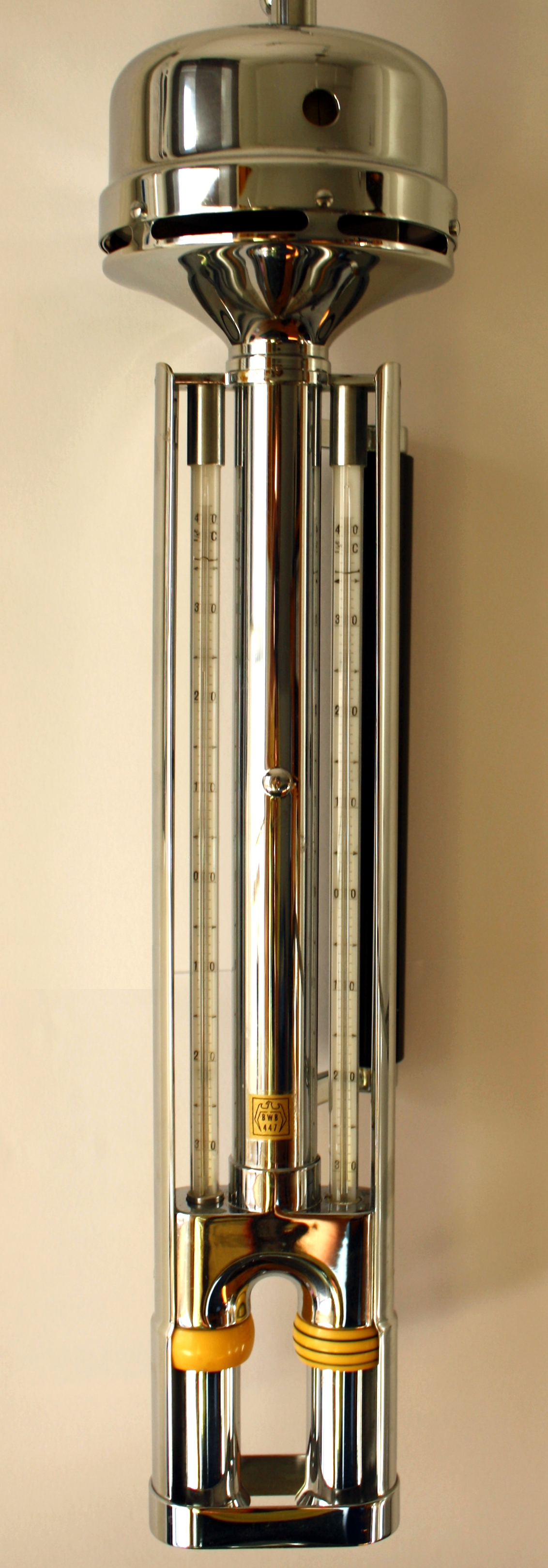 Aspirationspsychrometer nach Assmann. Fabrikat Lambrecht, Göttingen